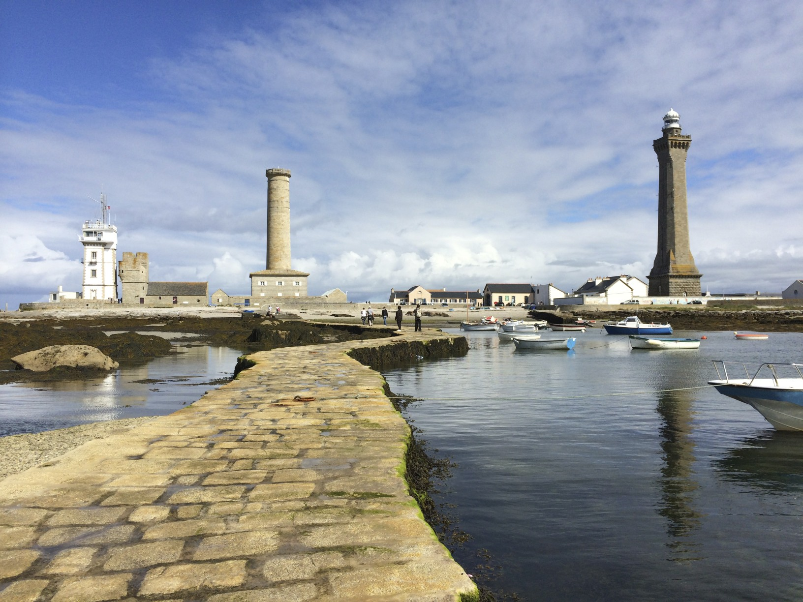 Phares de la pointe de Penmarc'h comprenant le phare d'Eckmühl .